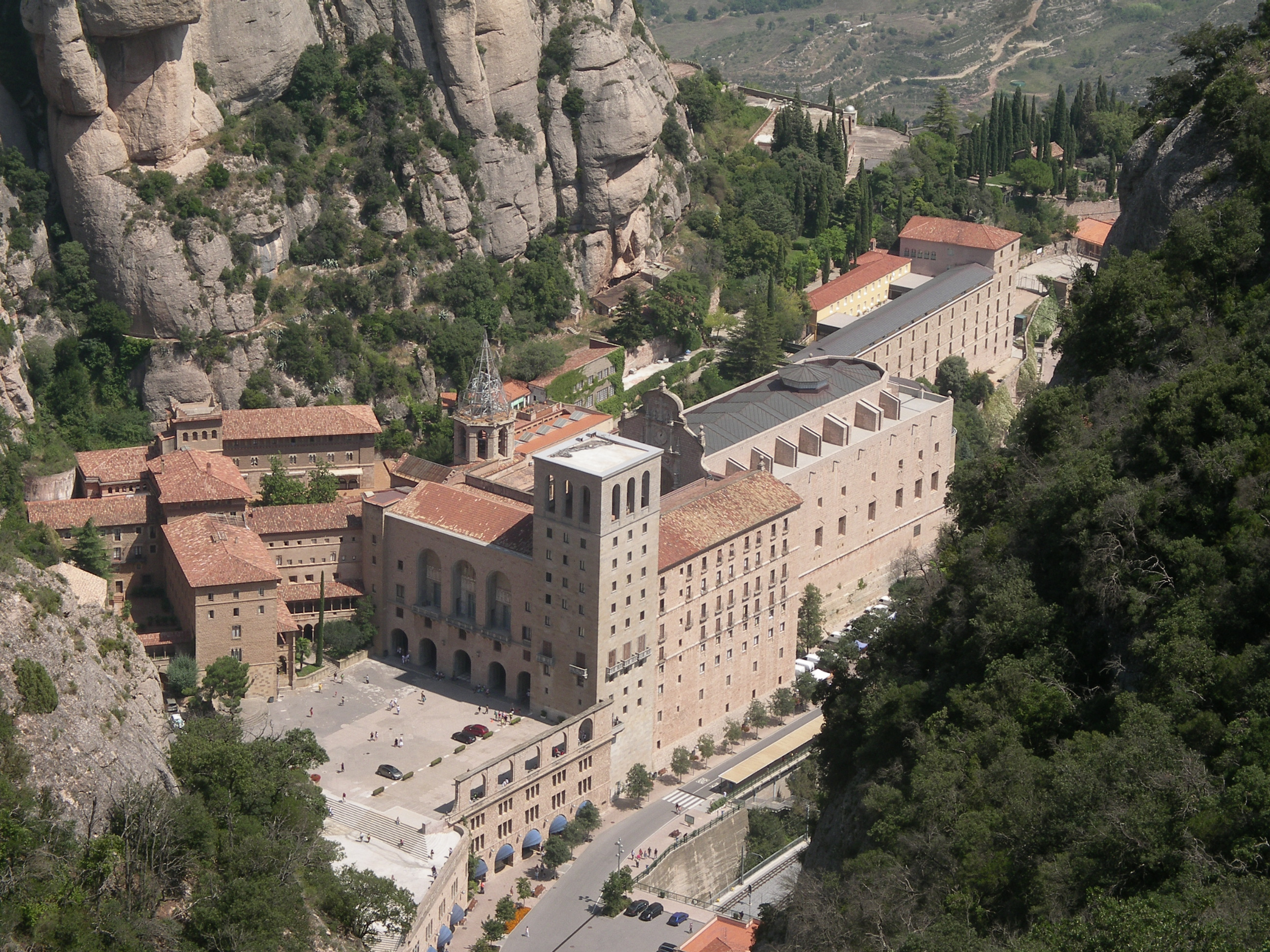 Monestir de Montserrat des de Sant Joan